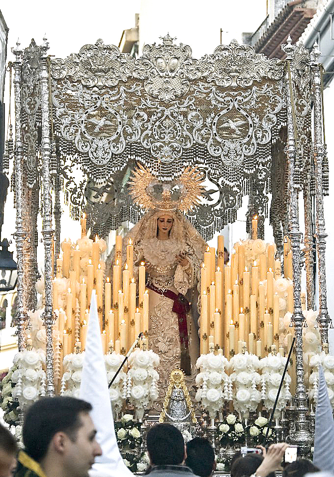 Palio de la Virgen de la Paz